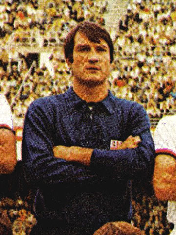 Il portiere di calcio italiano Enrico Albertosi al Cagliari, in un'amichevole del precampionato 1969-70 allo stadio San Siro di Milano contro l'Inter.